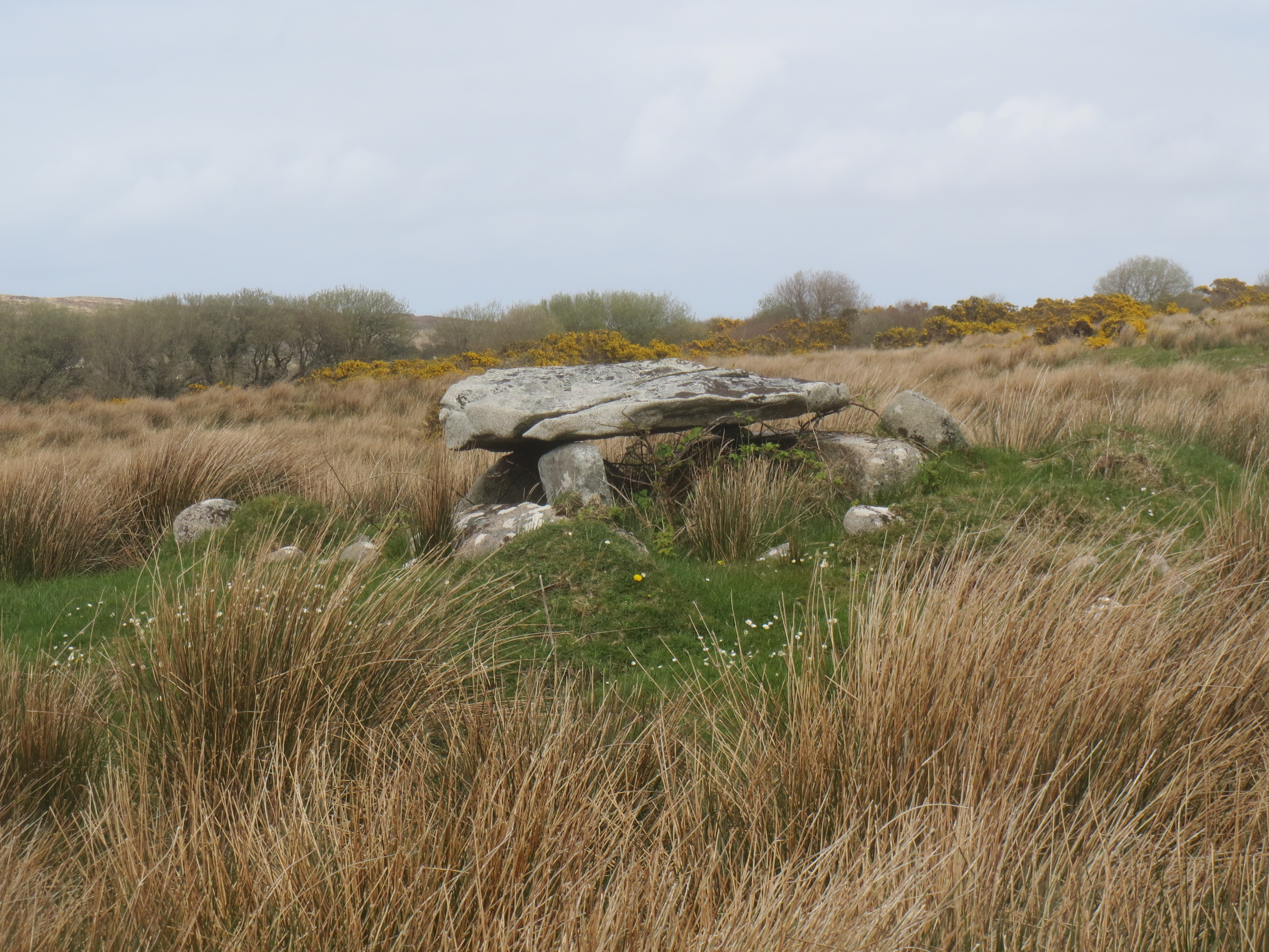 Kilclooney More 2 (West)